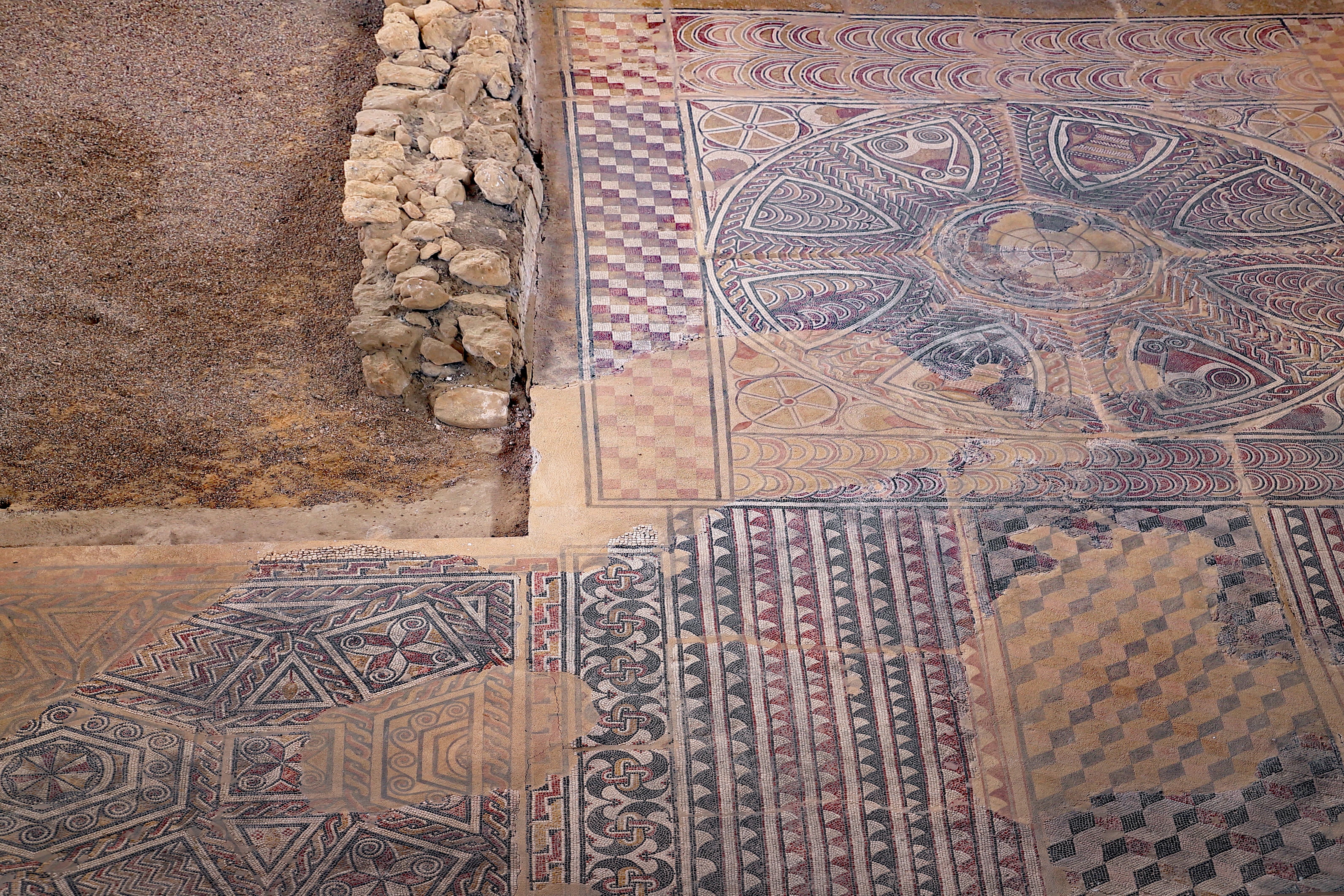 Baños de Valdearados es un municipio de la comarca Ribera de Duero, en la provincia de Burgos.